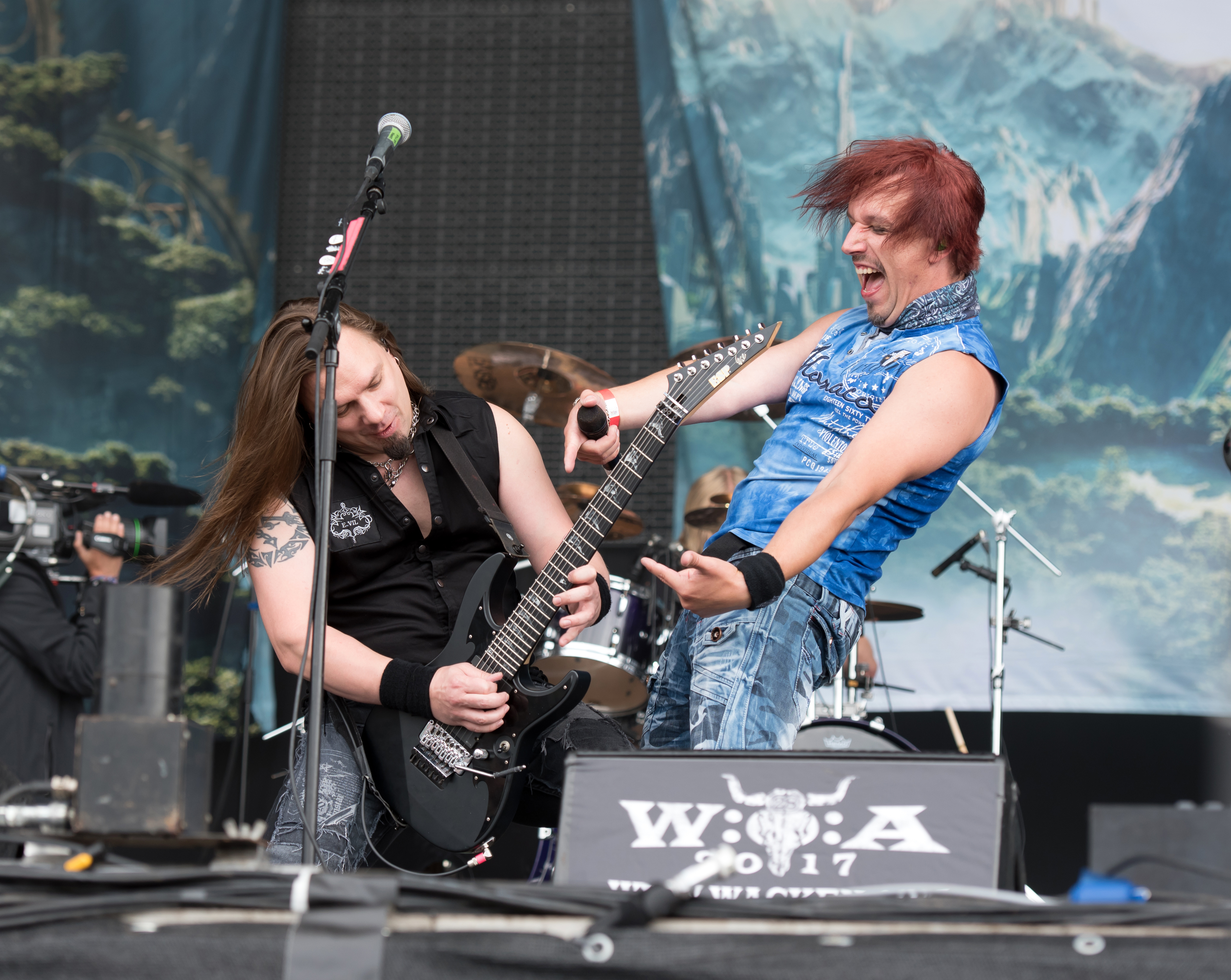 Sonata Arctica beim Wacken Open Air 2017